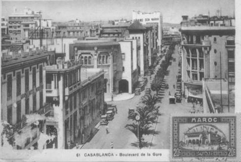 photo prise en 1920 du boulevard de la gare - Mohammed V